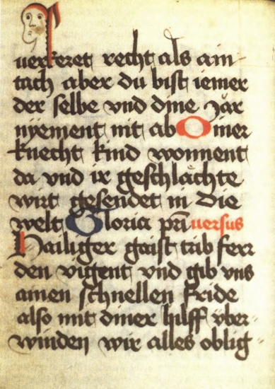 Rastatter Stundenbuch, Rastatt, Bibl. des Ludwig-Wilhelm-Gymnasiums, Cod. K 173